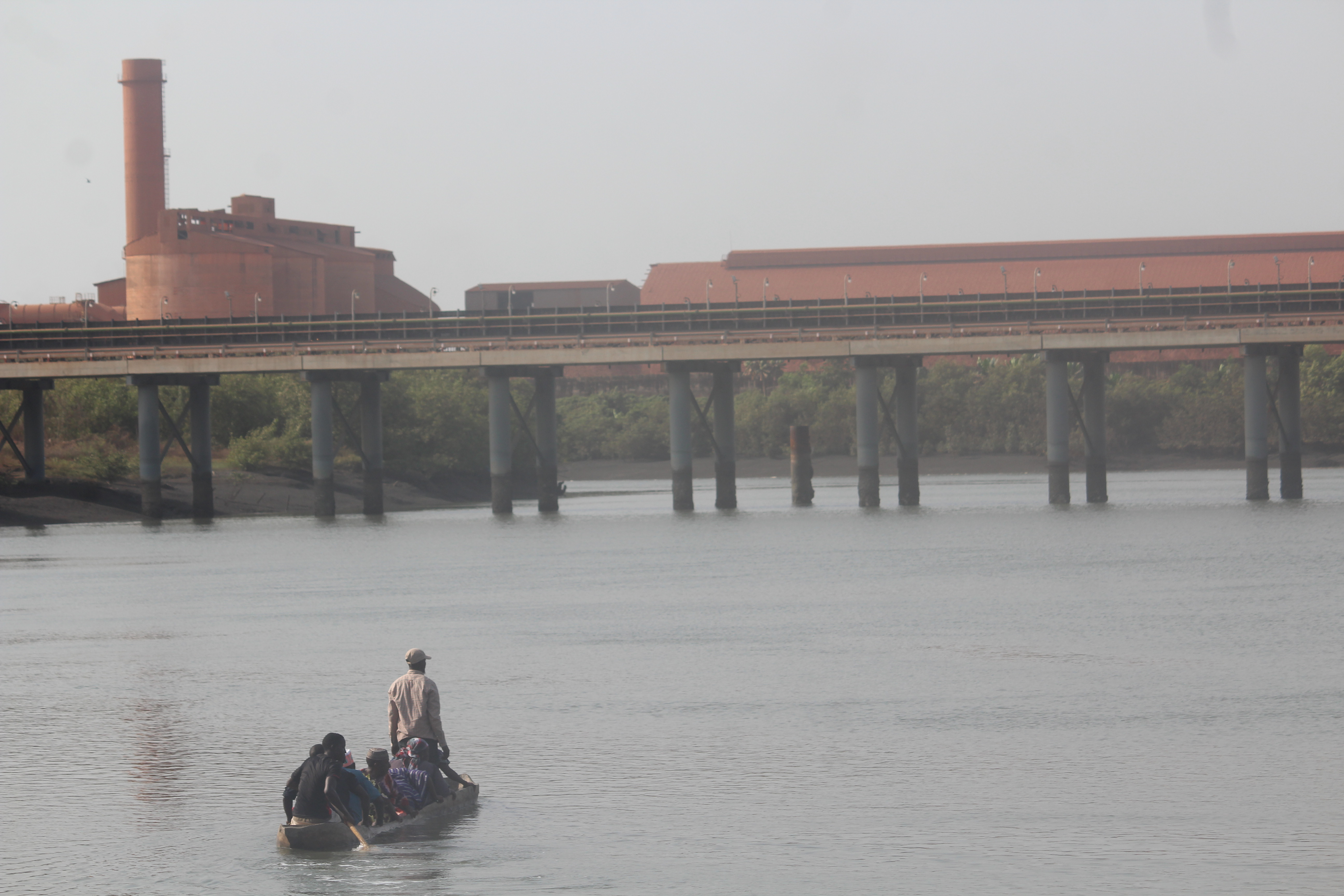 Tapis de GAC et une vue de l'usine de CBG Kamsar This is an image with the theme "Africa on the Move or Transport" from: Guinea